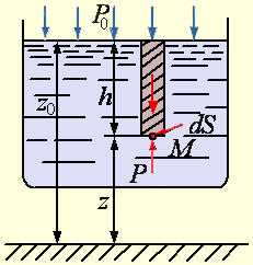 Attēls 1.